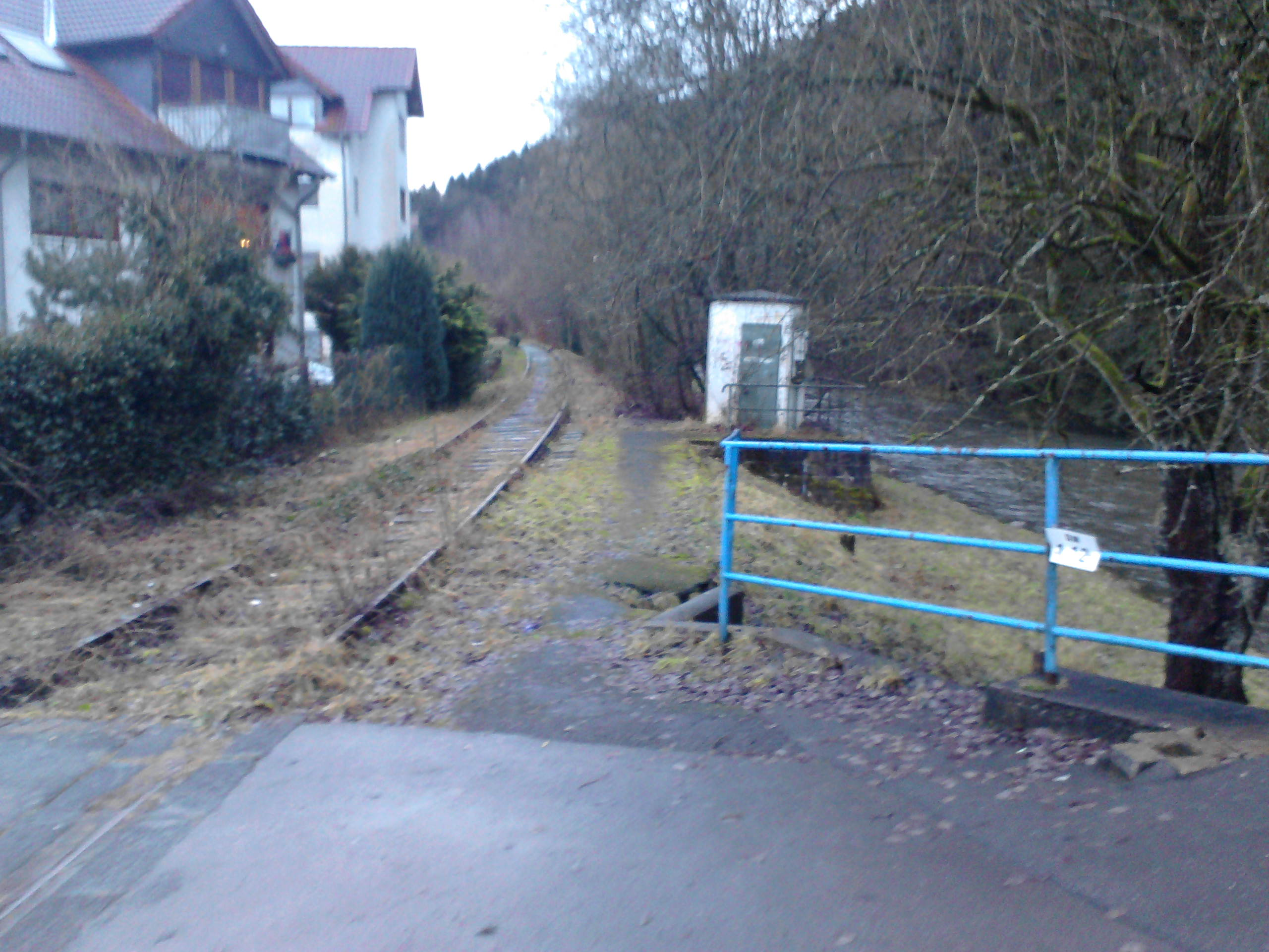 Bahnübergang Alpestraße am 26. Dezember 2012